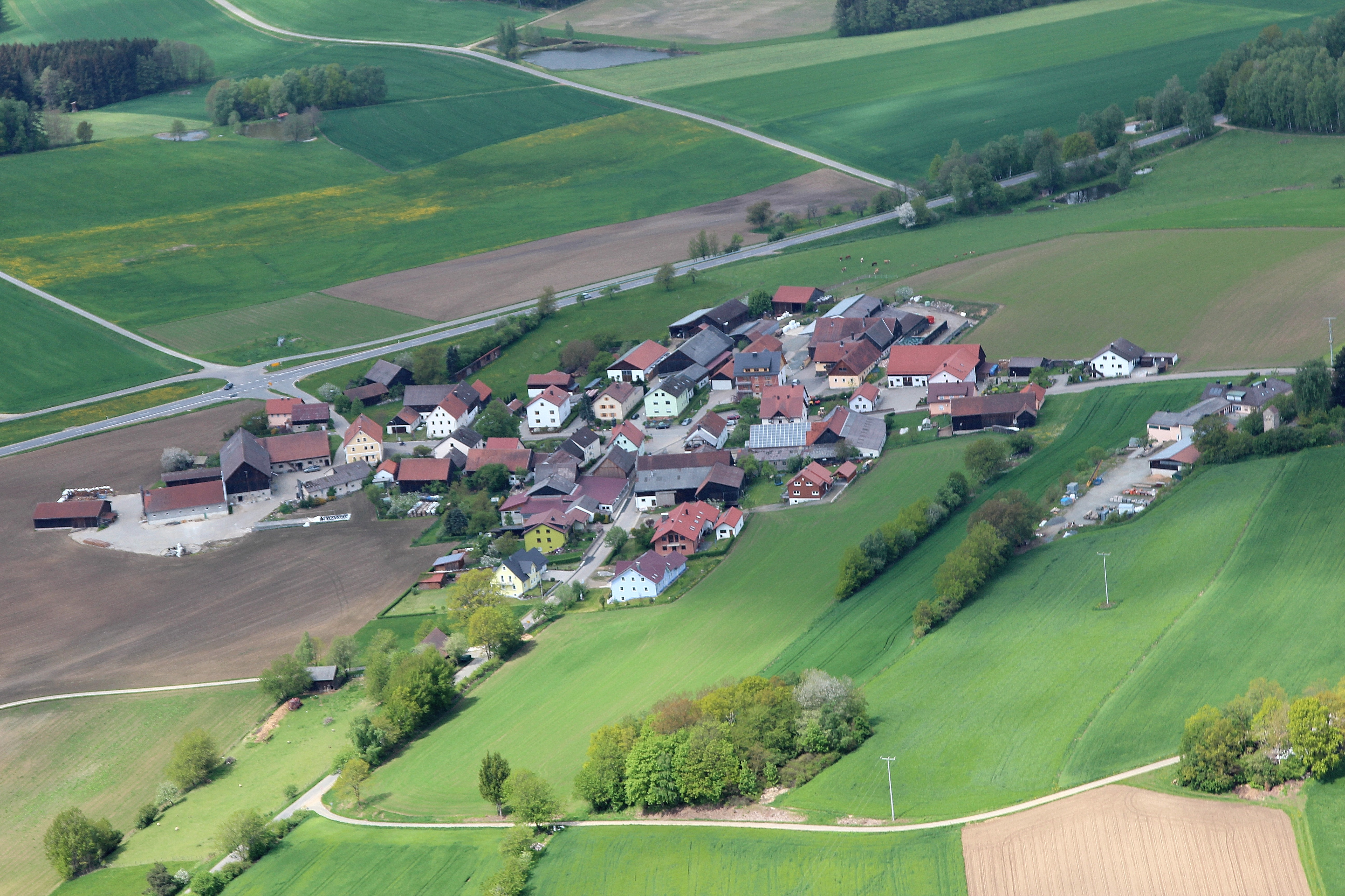 Zeinried an der B 22, Gemeinde Teunz, Landkreis Schwandorf, Oberpfalz, Bayern (2015)